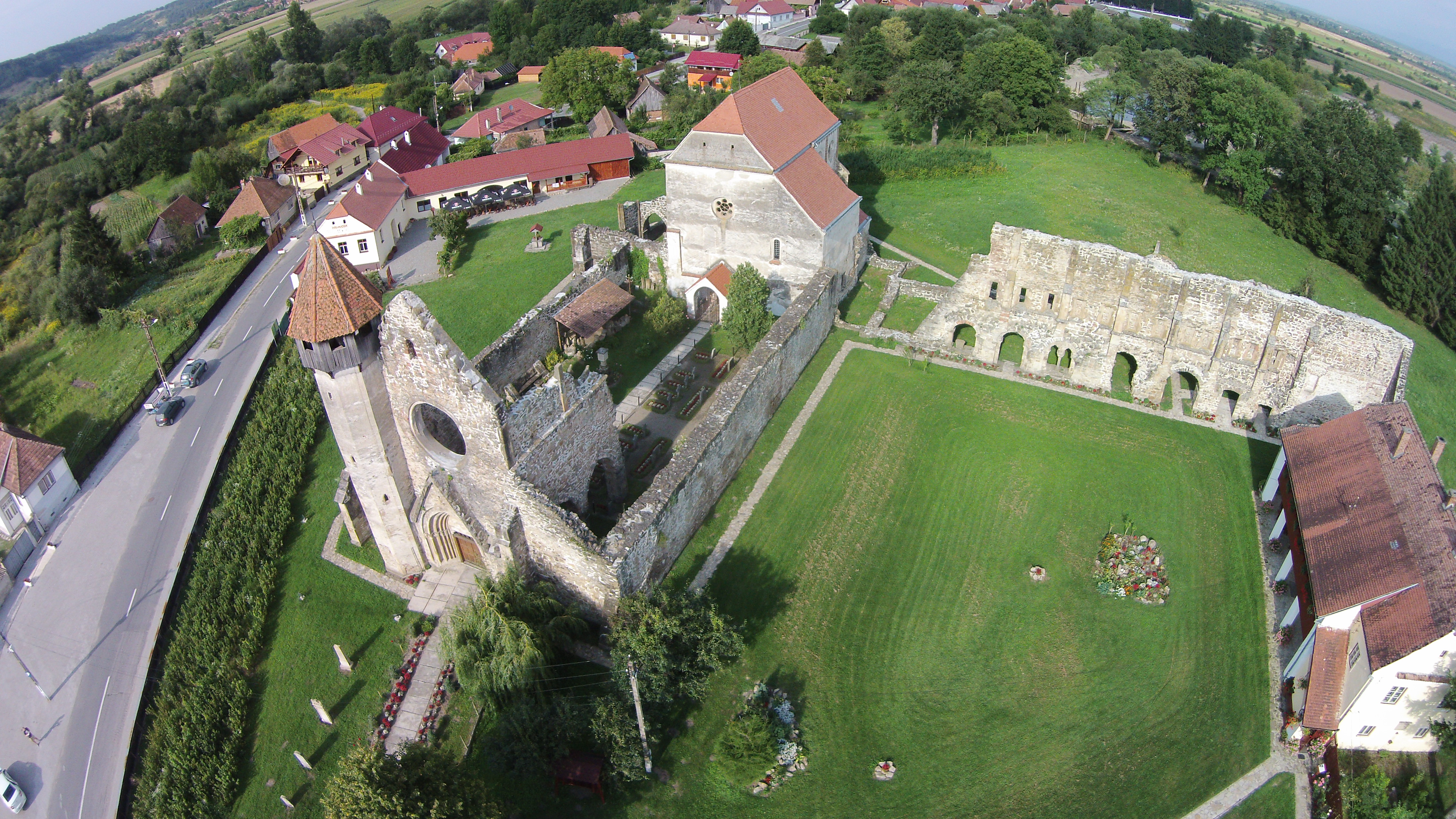 Ansamblul fostei mănăstiri cisterciene-vedere aeriana